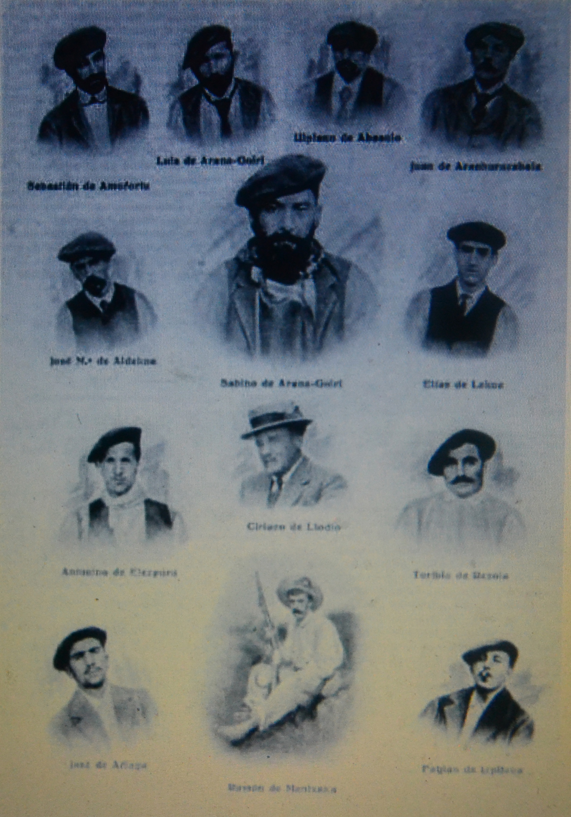 Euskeldun Batzokija euskal elkarte abertzalearen Zuzendaritza Batzordeko batzordekideak 1894an. Members of Executive Committee of basque nationalism society Euskeldun Batzokija in 1894.